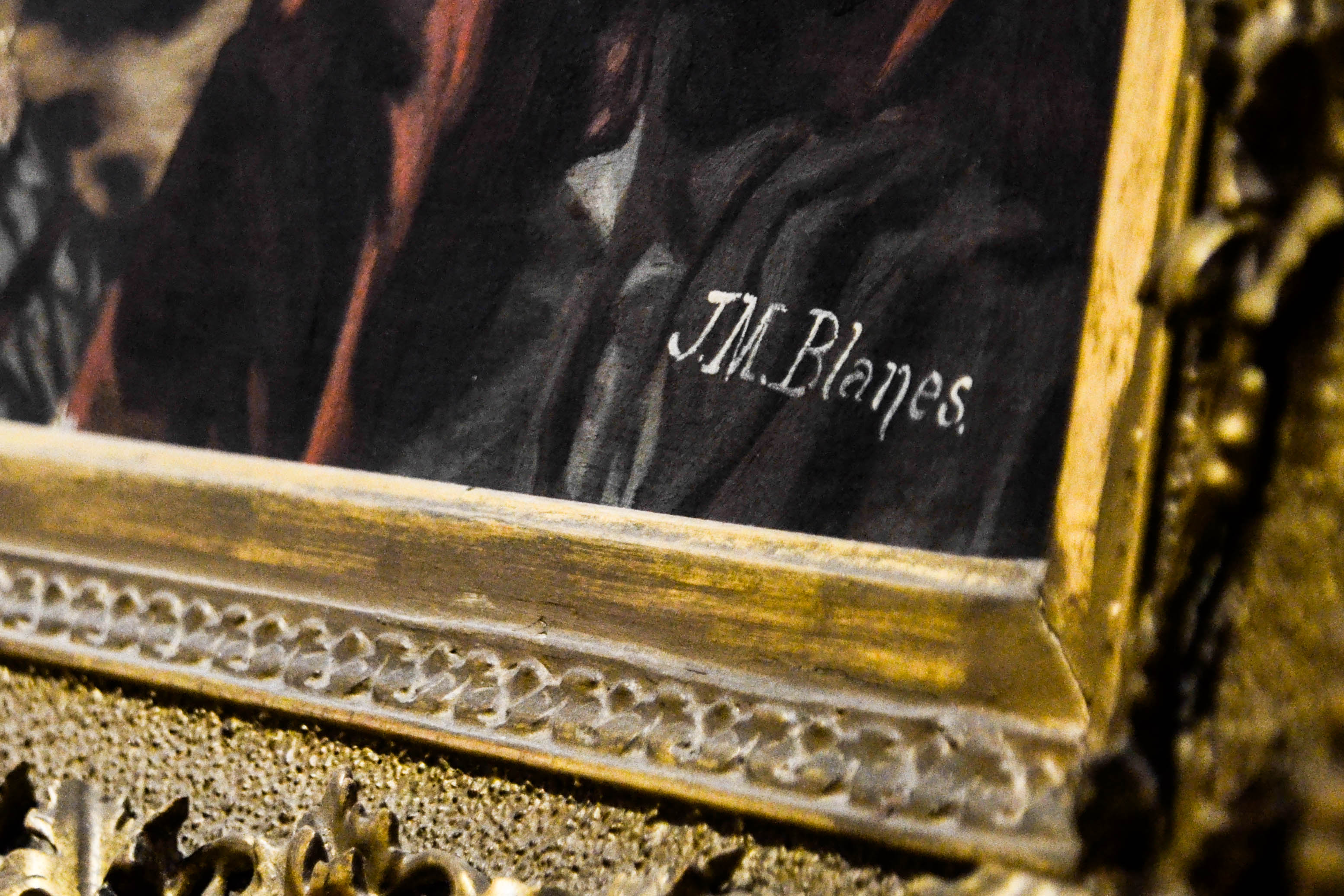 Firma de Juan Manuel Blanes en "Demonio, mundo y carne" Óleo sobre tela, 106 × 156 cm sitoen Museo Blanes